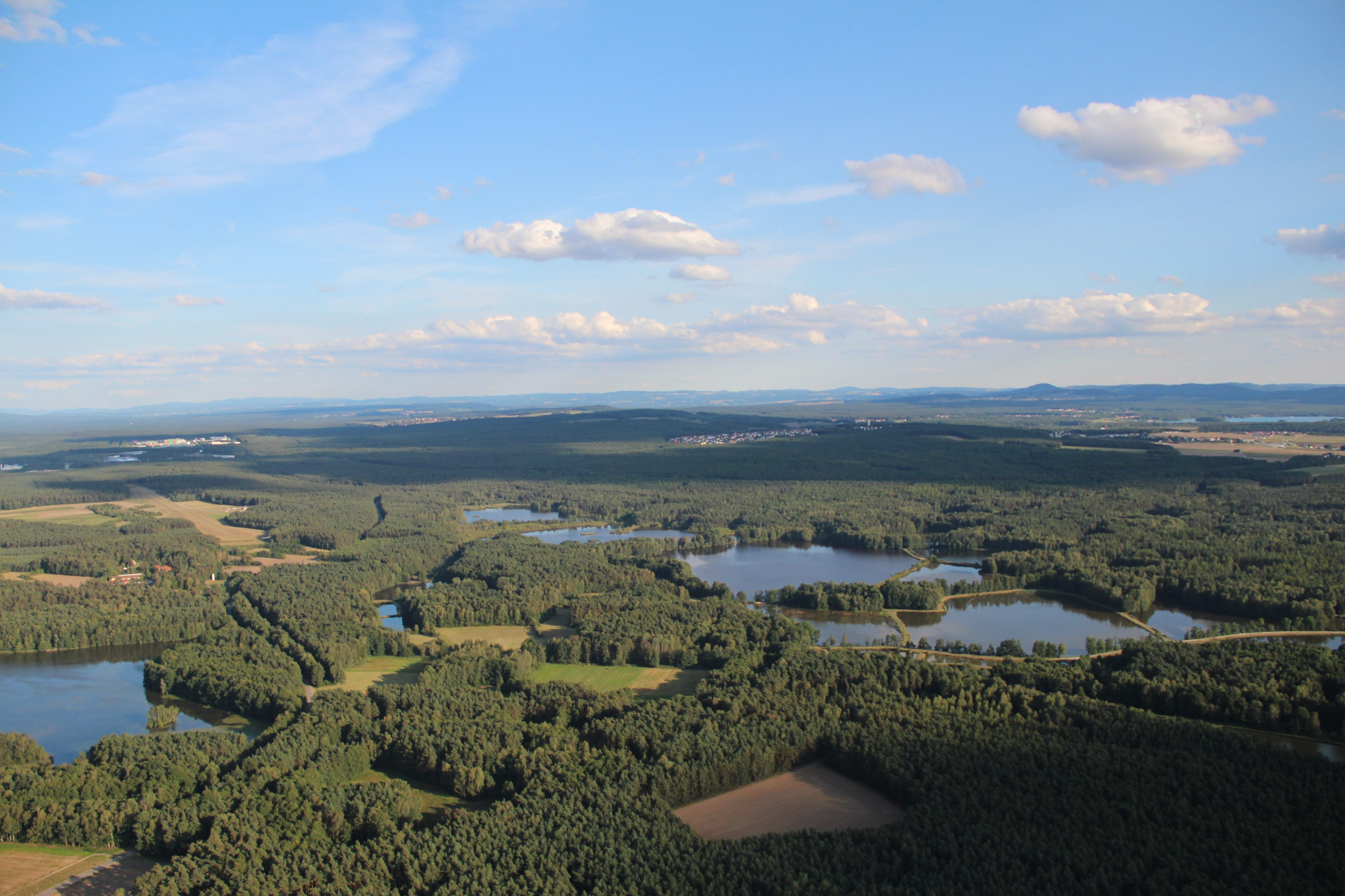 Oberpfälzer Seenland im Landkreis Schwandorf, Oberpfalz, Bayern (2012)